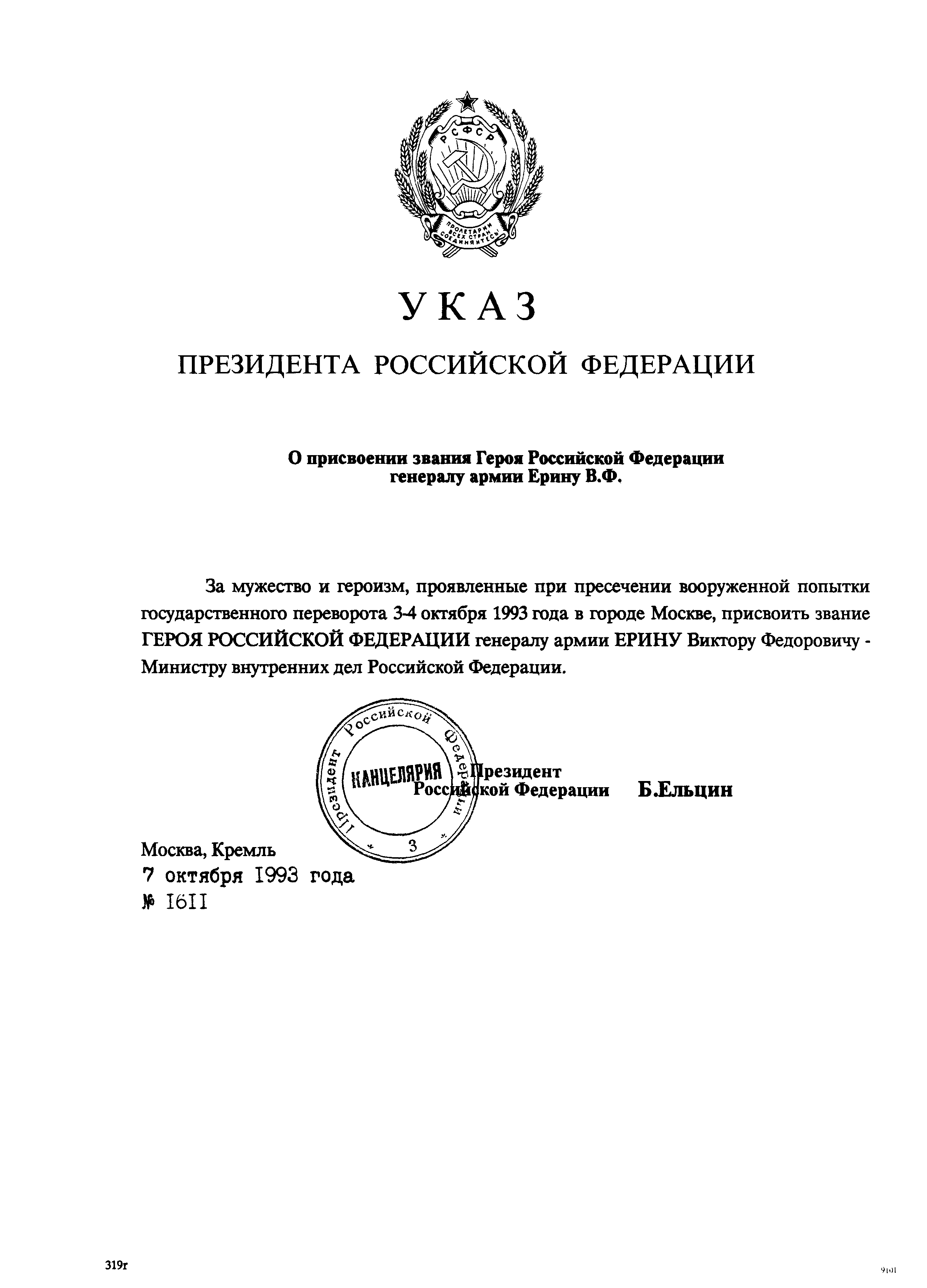 "О ПРИСВОЕНИИ ЗВАНИЯ ГЕРОЯ РОССИЙСКОЙ ФЕДЕРАЦИИ ГЕНЕРАЛУ АРМИИ ЕРИНУ В.Ф."